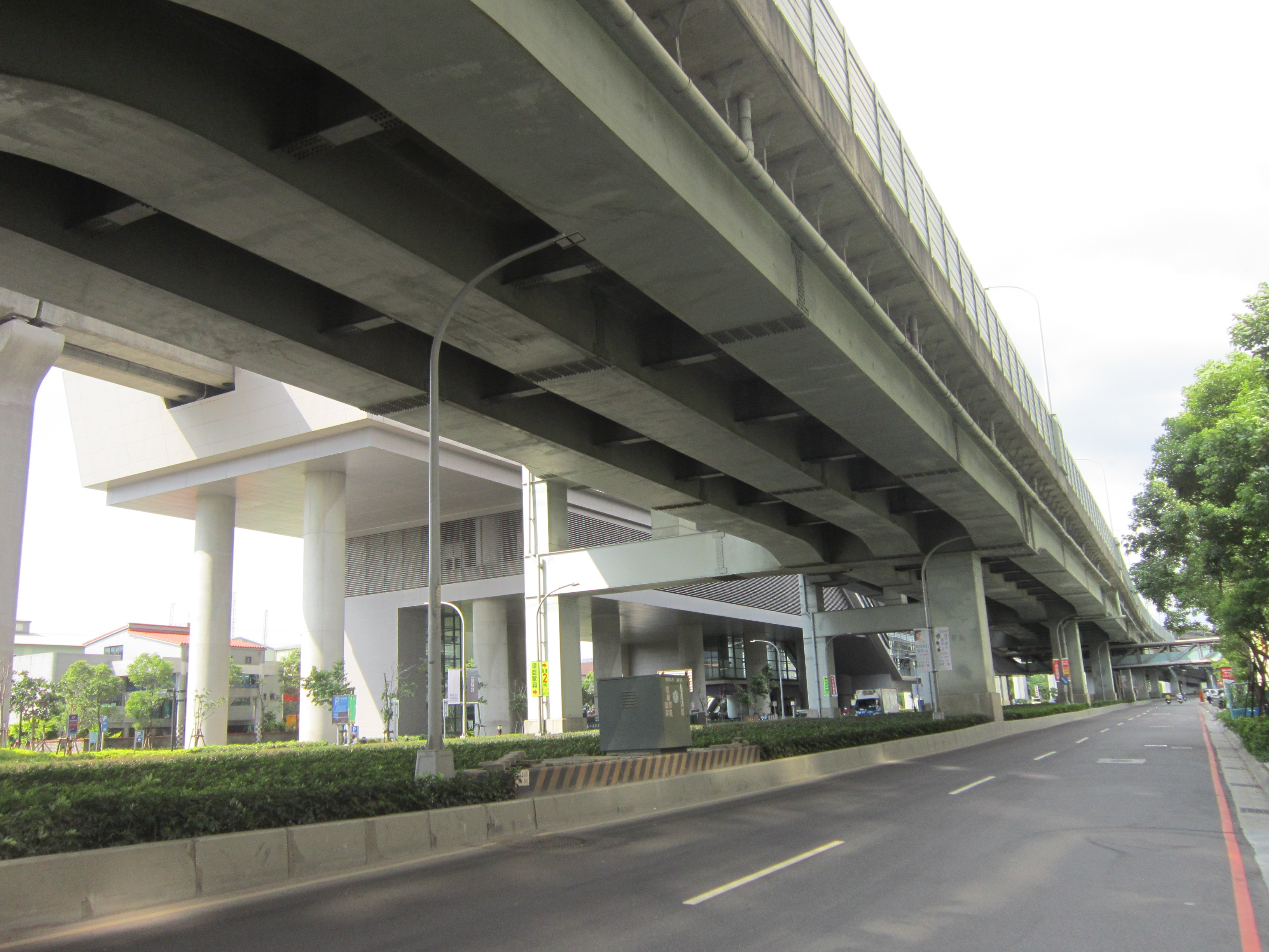 台1線新莊段。上方為台1線高架段，左側為桃園國際機場捷運新莊副都心站，平面道路為新北大道。